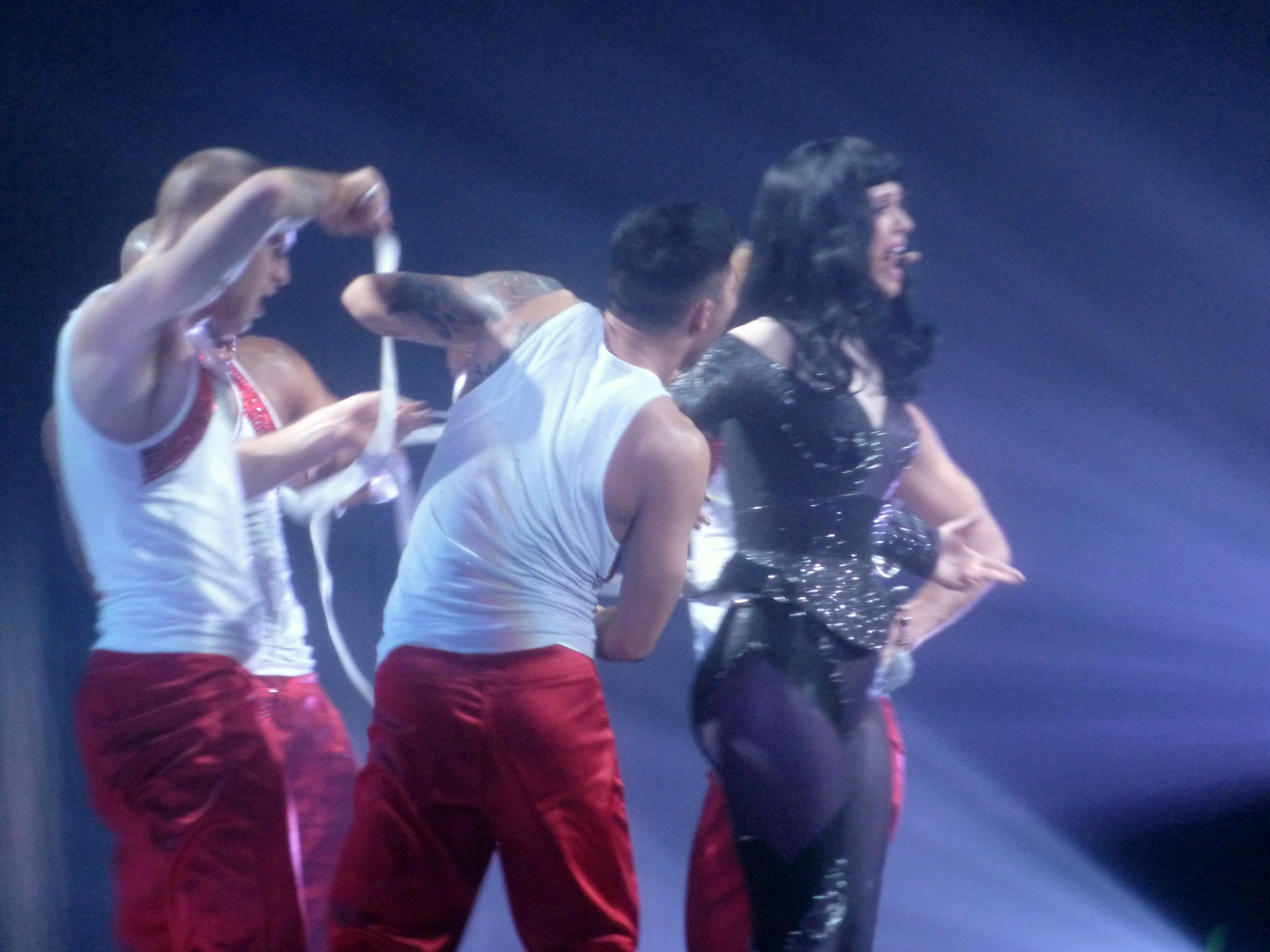 Photos de Katy Perry en concert au Zenith de Paris en mars 2011 dans le cadre de sa tournée " California Dreams Tour "